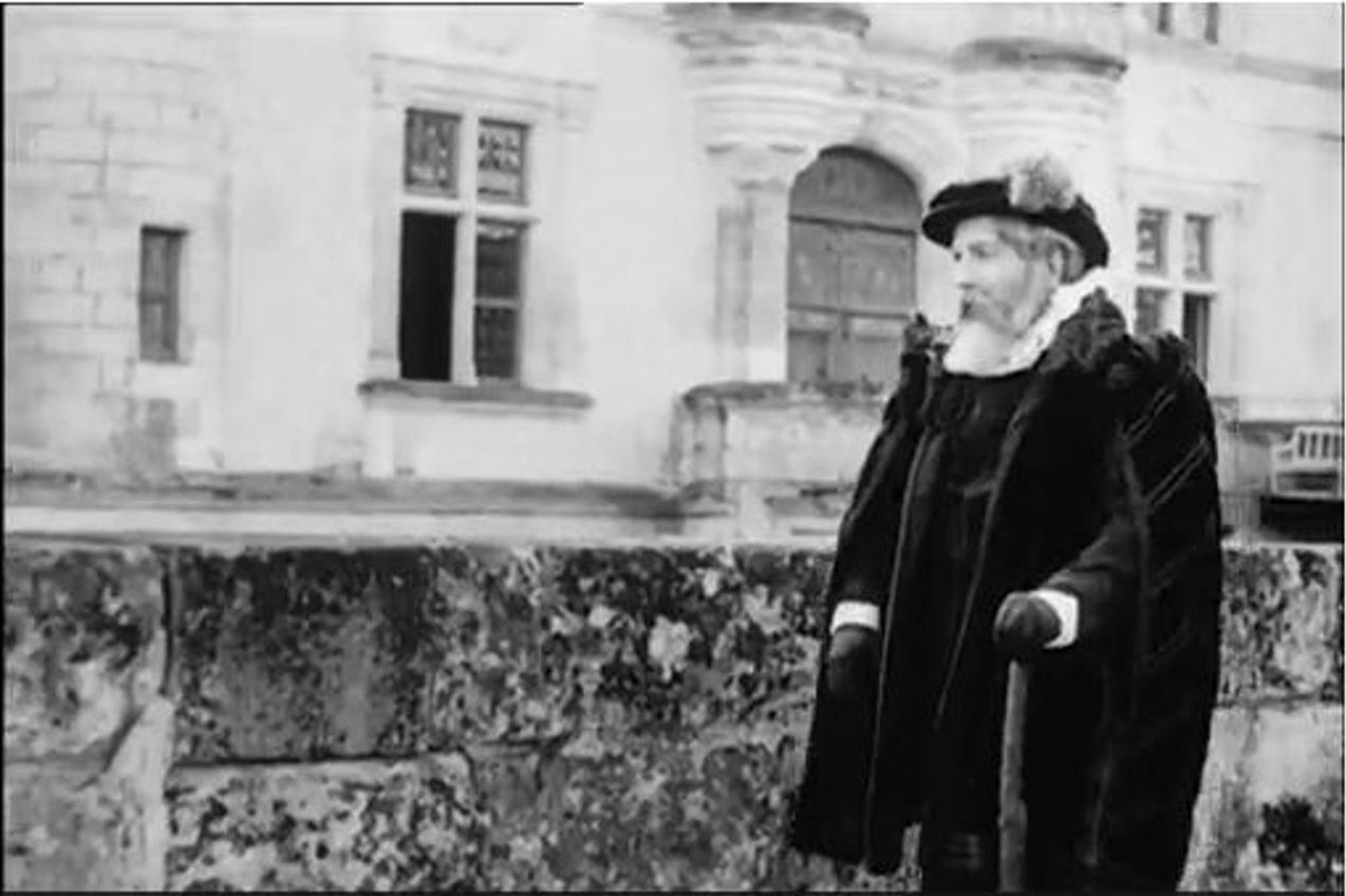 Le réalisateur de cinéma Émile Chautard se sert des extérieurs du château de Chenonceau dans le département de l'Indre-et-Loire pour tourner un film muet, La Dame de Monsoreau, d'après l'œuvre éponyme d'Alexandre Dumas, en 1913.